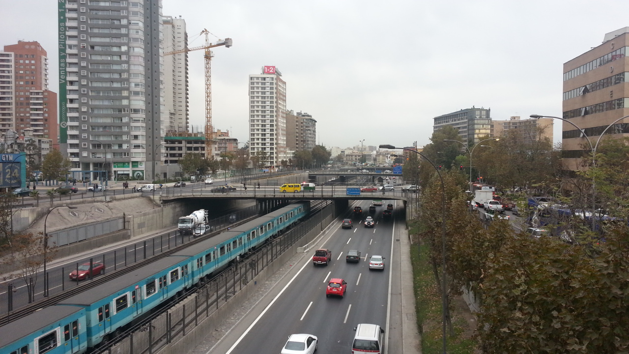 Autopista Central, junto a ella el metro de Santiago de Chile.